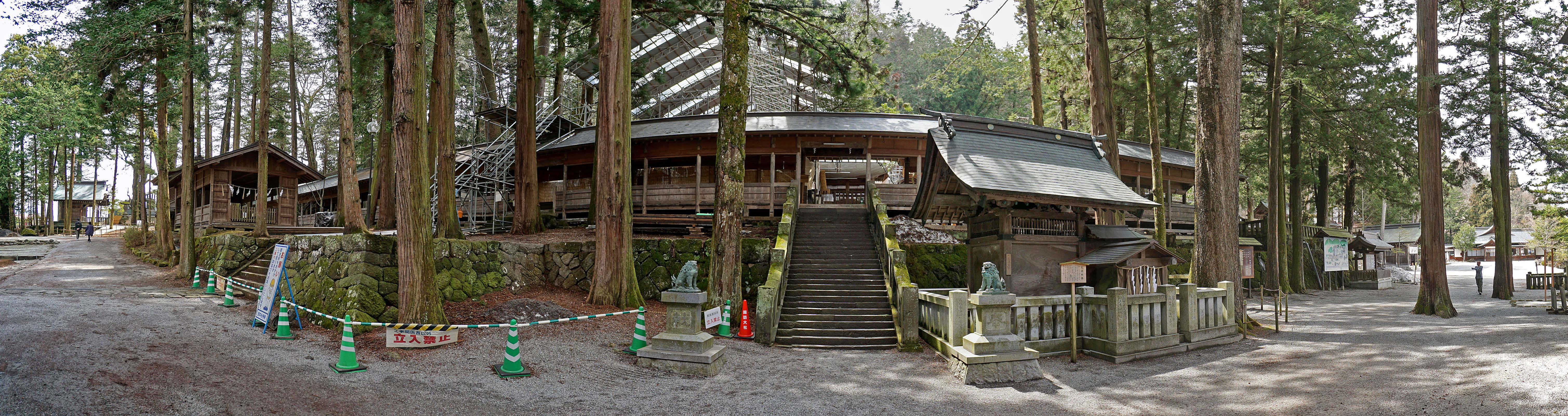 Suwa taisha Kamisha Honmiya , 諏訪大社 上社 本宮